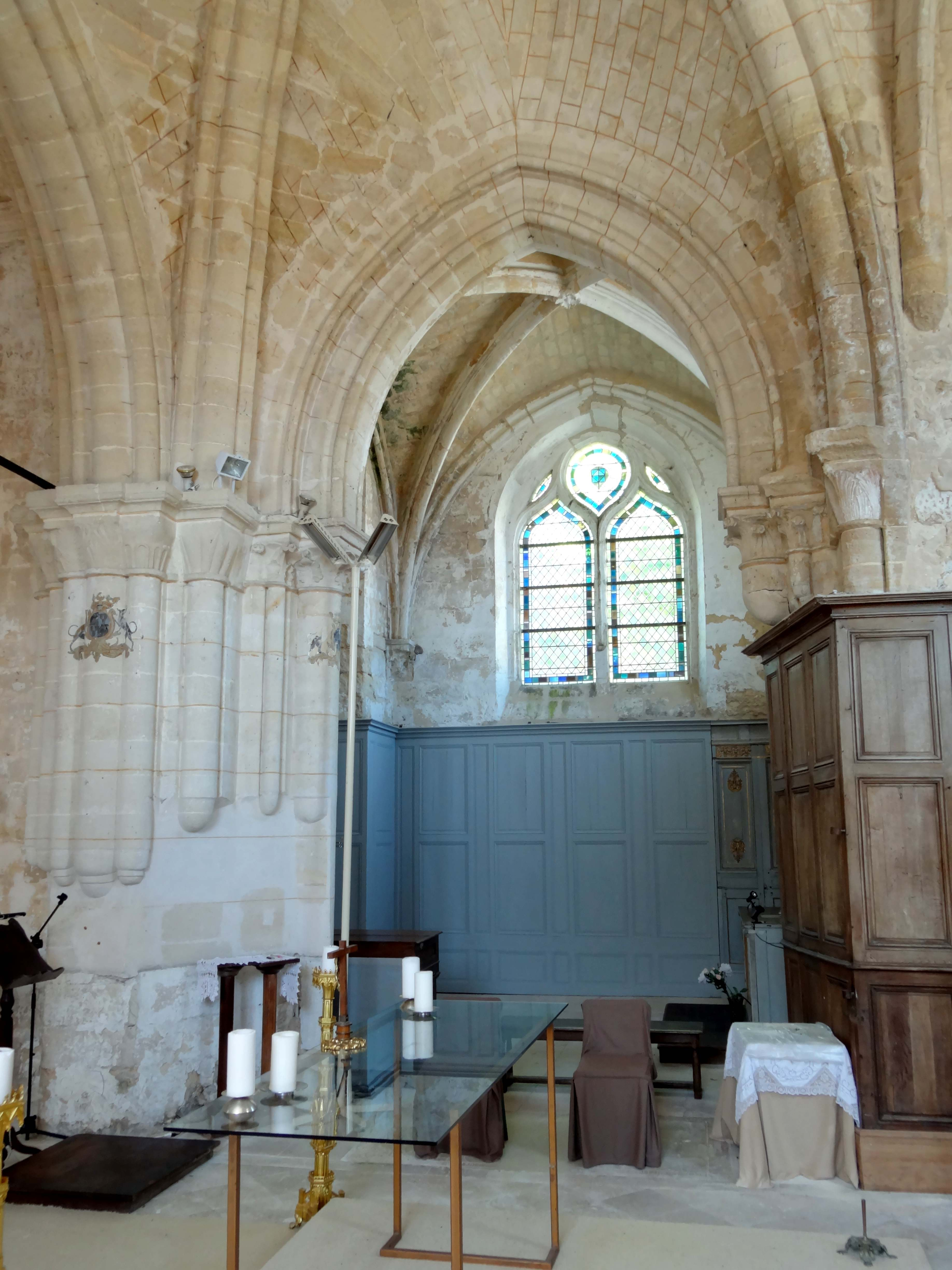 Intérieur de l'église - voir titre.